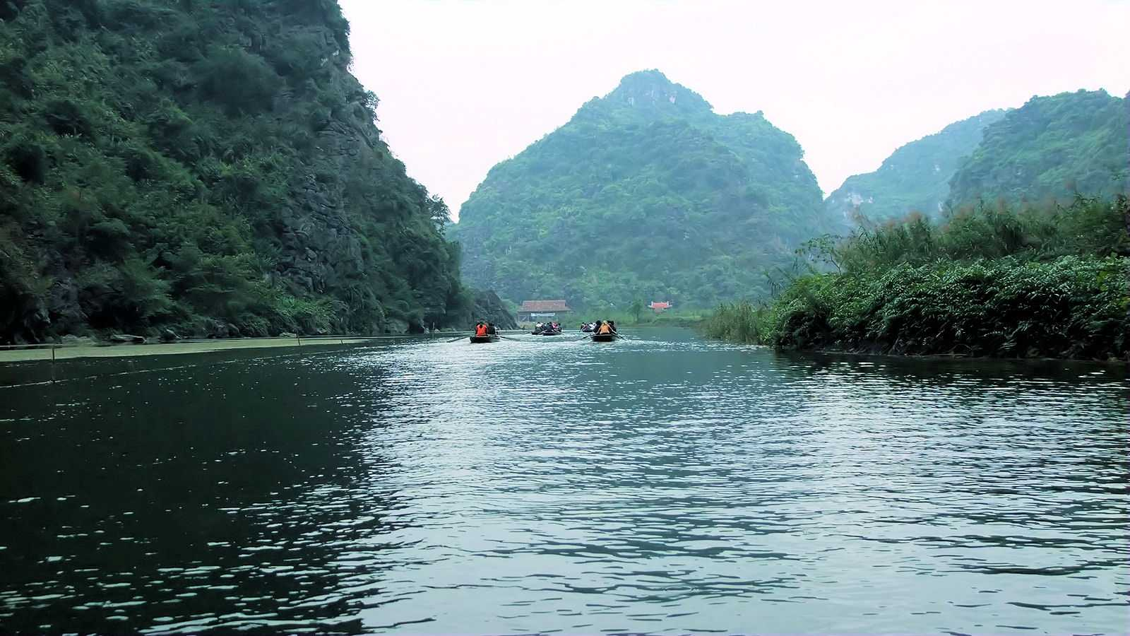 Phong cảnh khu du lịch Tràng An ở Hoa Lư - Ninh Bình Cập nhật ảnh cùng vị trí nhưng có góc nhìn và nước ảnh đẹp hơn